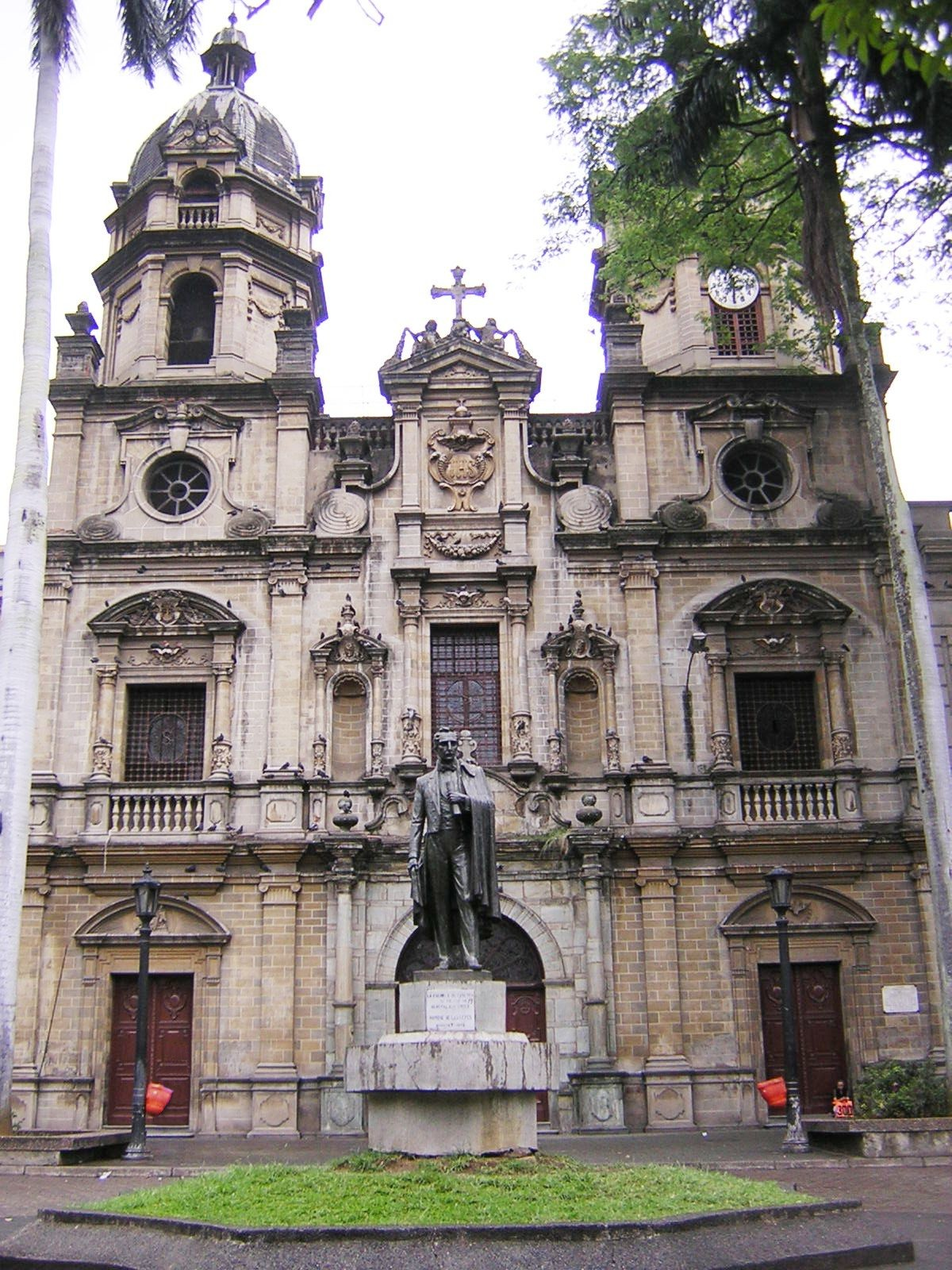 Fachada de la Iglesia de San Ignacio de estilo barroco español, Medellín, Colombia.